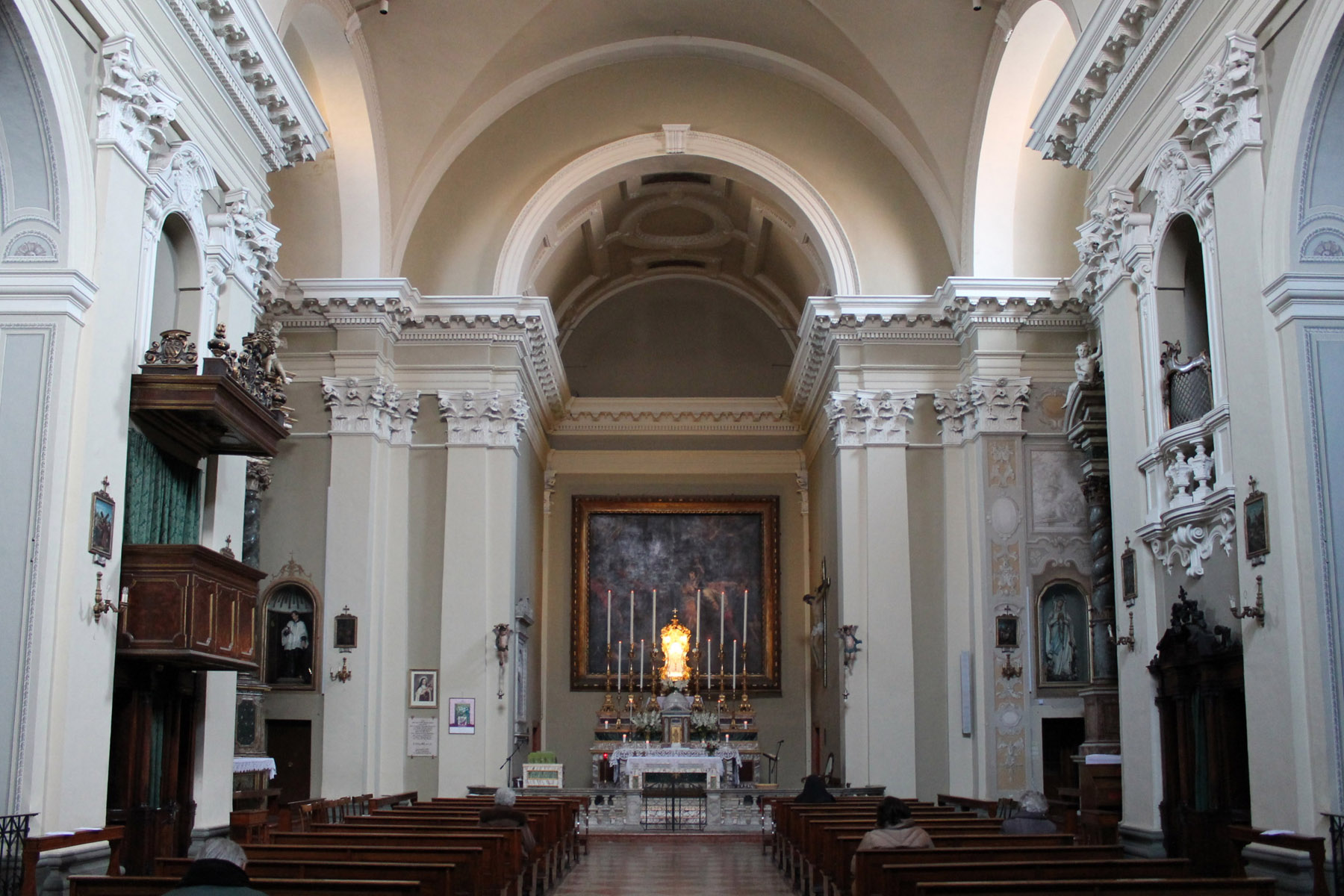 Chiesa di Sant'Agata (Imola) - Interno